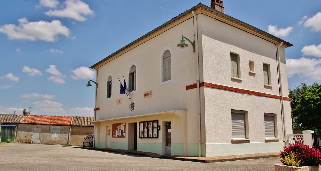 La Mairie